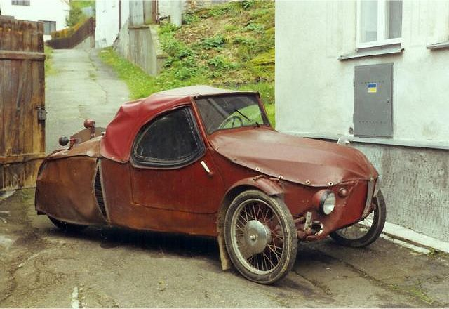 Velorex oskar 54, Boskovice (Csehország)